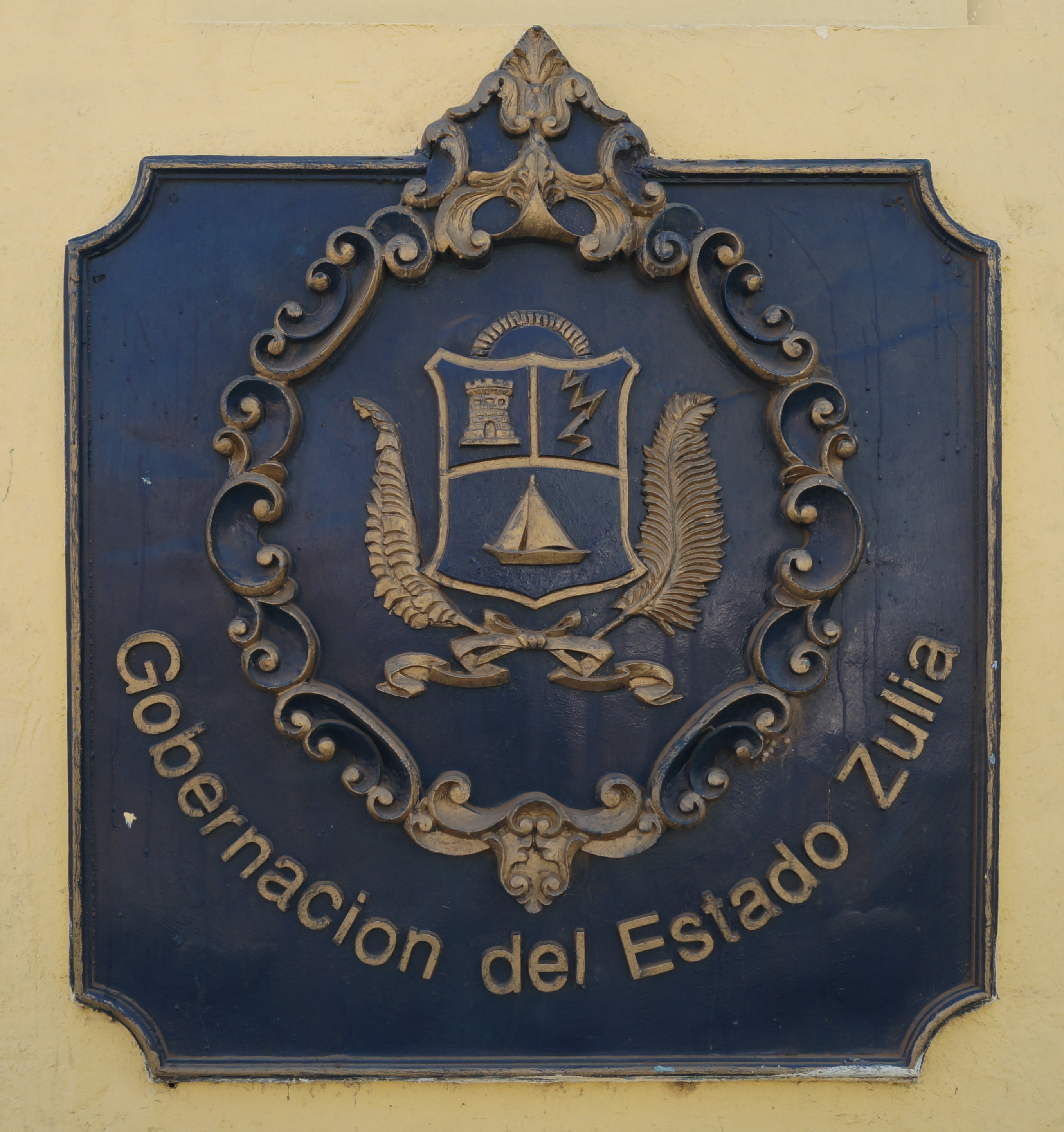 Escudo del Estado Zulia